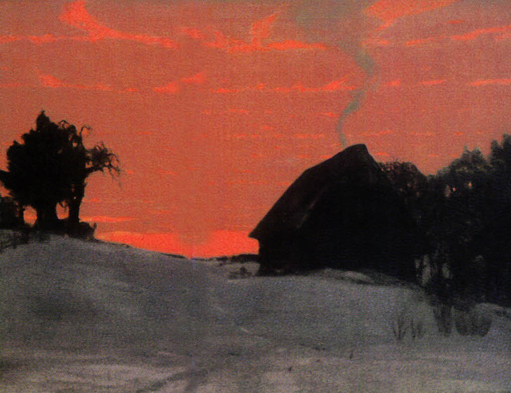 Dämmerung